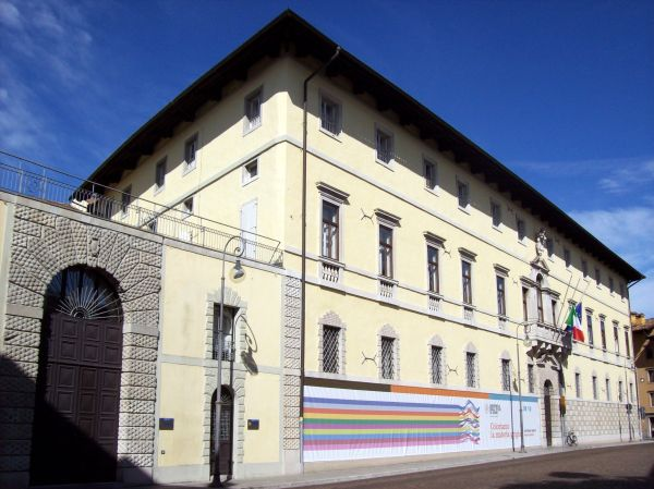 Udine (Friuli Venezia Giulia - Italy), Palazzo Antonini-Cernazai